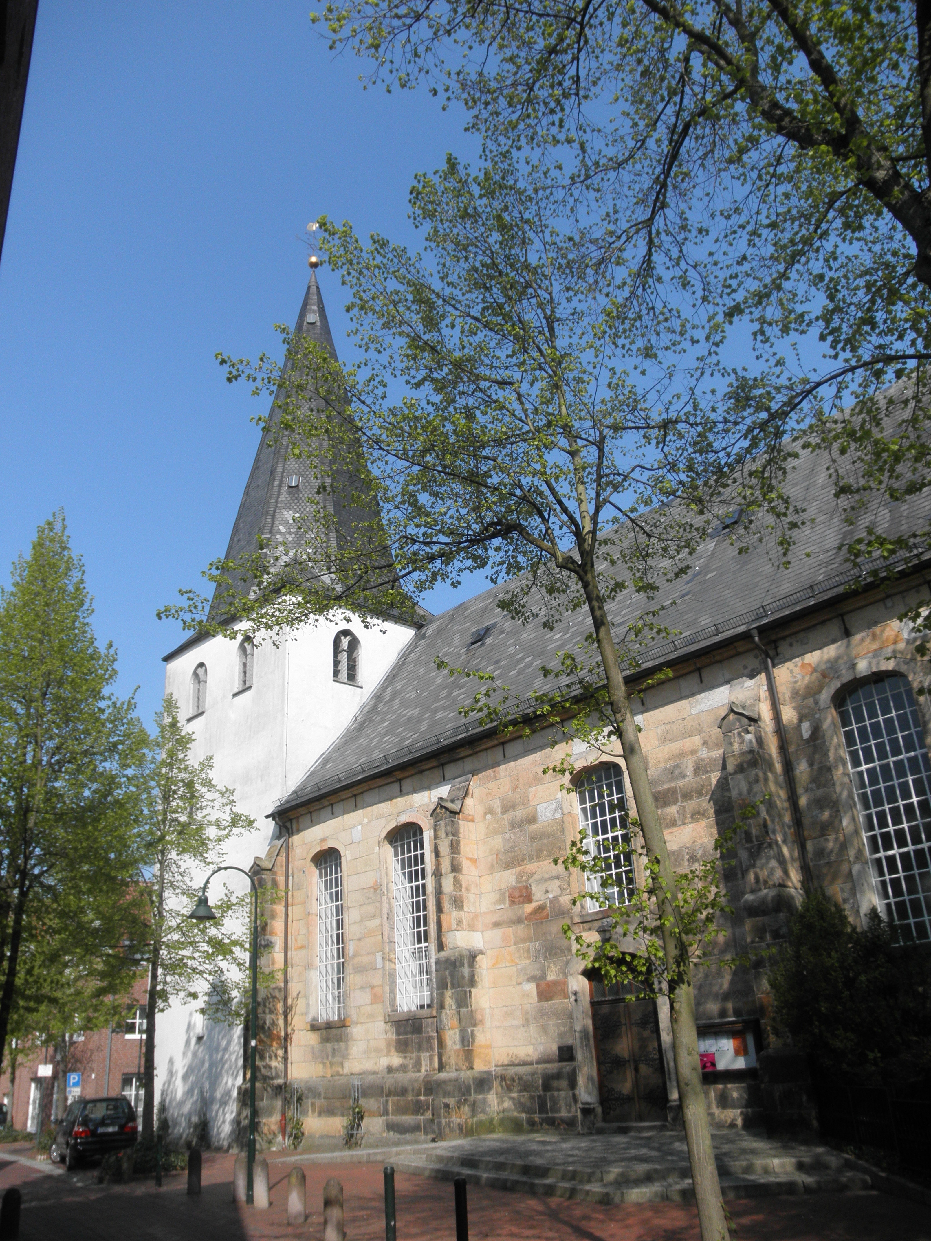 Preĝejo Reformierte Kirche en Lingen, Germanio